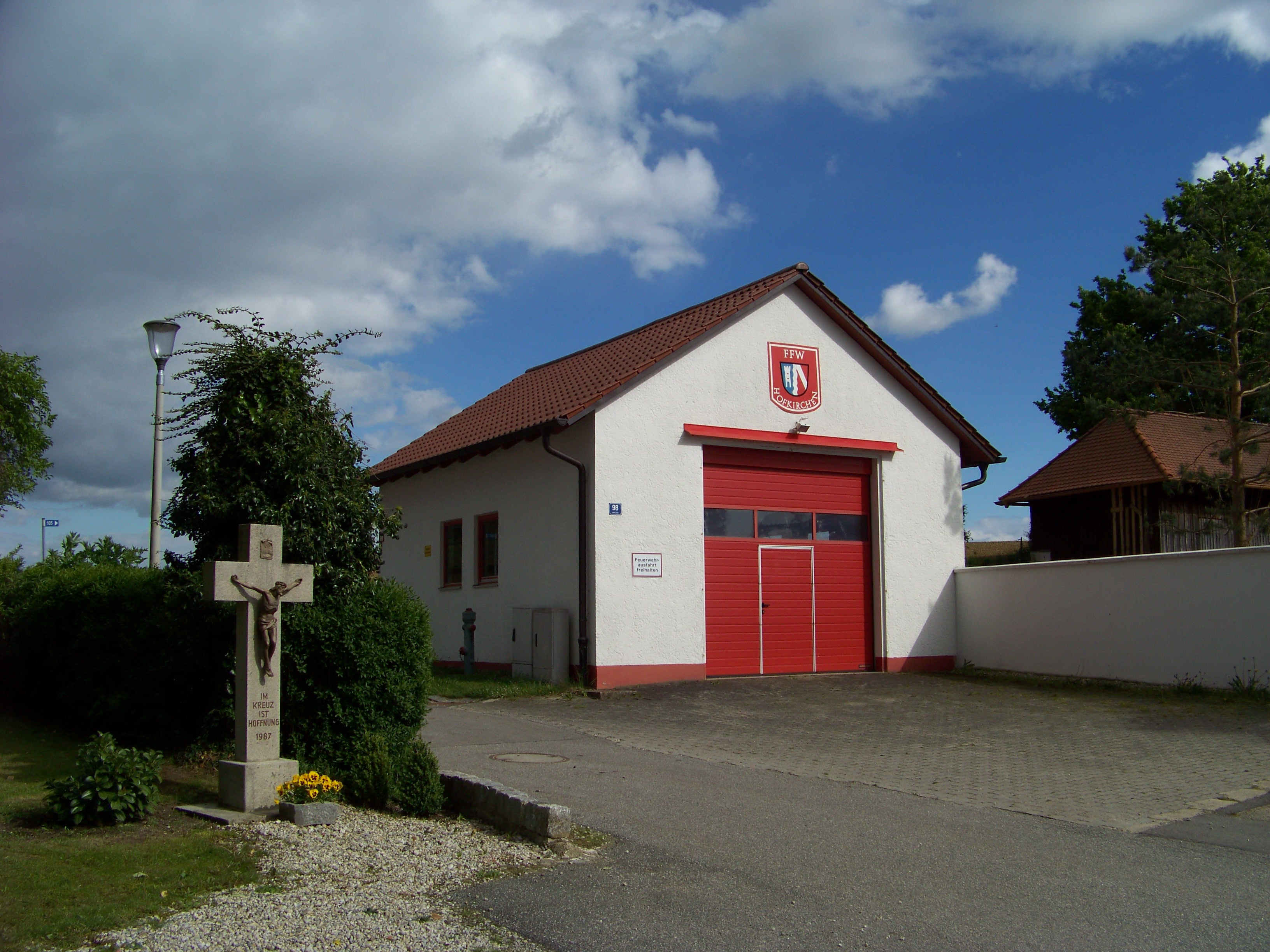 Laberweinting, Hofkirchen 98. Feuerwehrhaus.